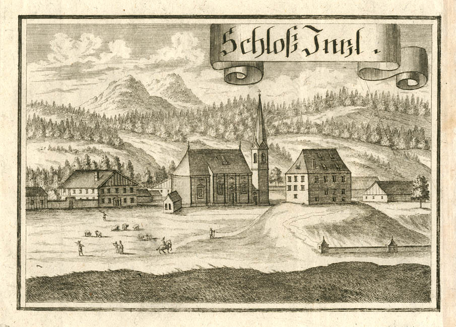 “Schloß Intzl”, aus : Beschreibung des Churfürsten- u. Hertzogthumbs Ober- und Nidern Bayrn. Rentamt München., 2. Auflage um 1750 (1. Auflage 1701)